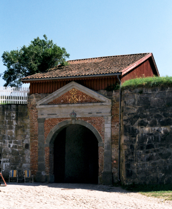 Fredriksten festning, Halden. Port, indre festning.